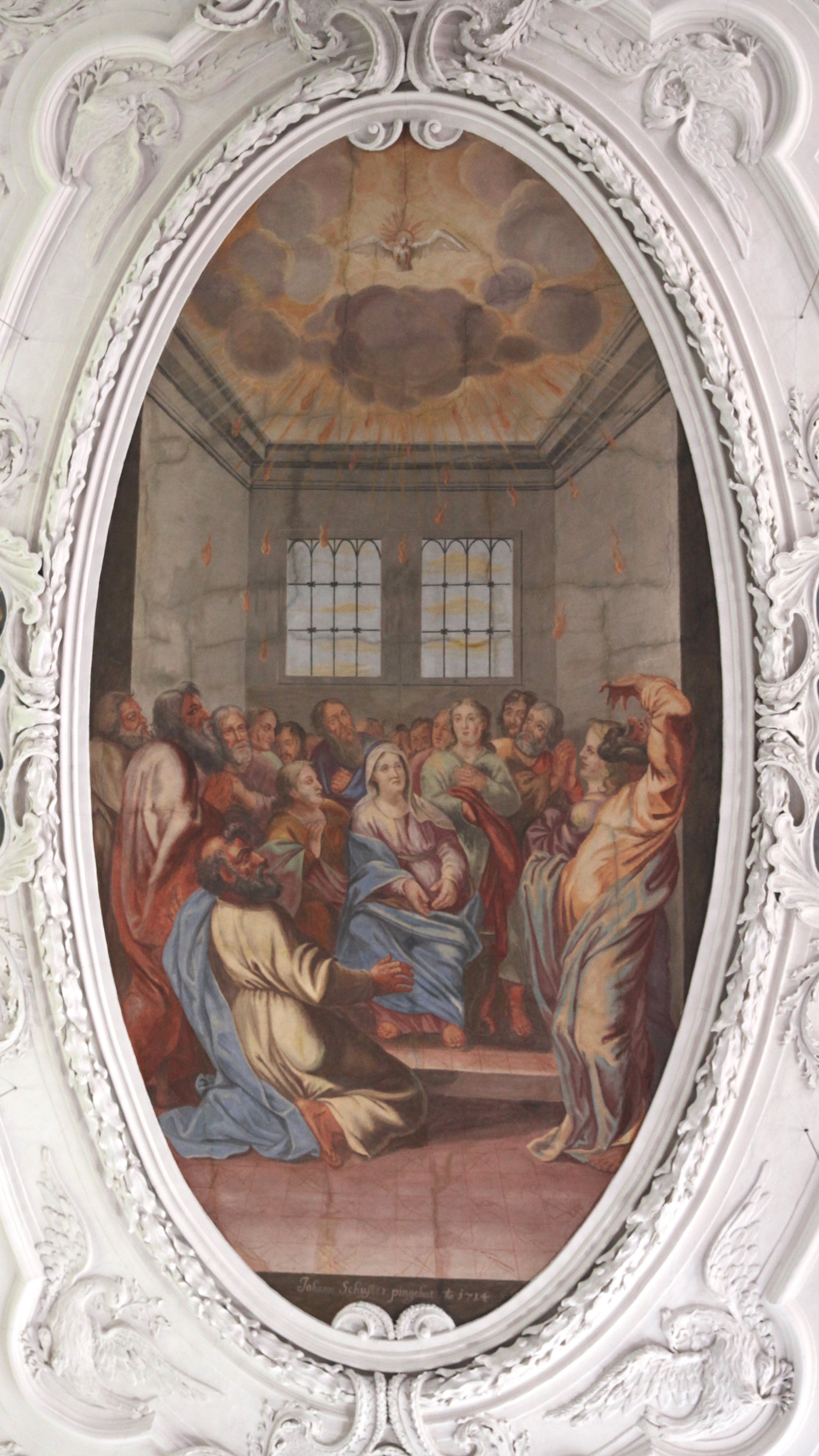 Deckengemälde, Evangelische Matthäuskirche, Gestungshausen